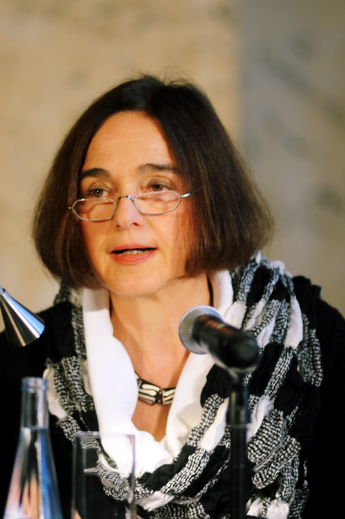 Berlin, 09.12.12 Szenische Lesung über "Stefan Heym - Einer,der nie schwieg" im Palais am Festungsgraben. Mit Daniela Dahn.. Foto. Ulli Winkler